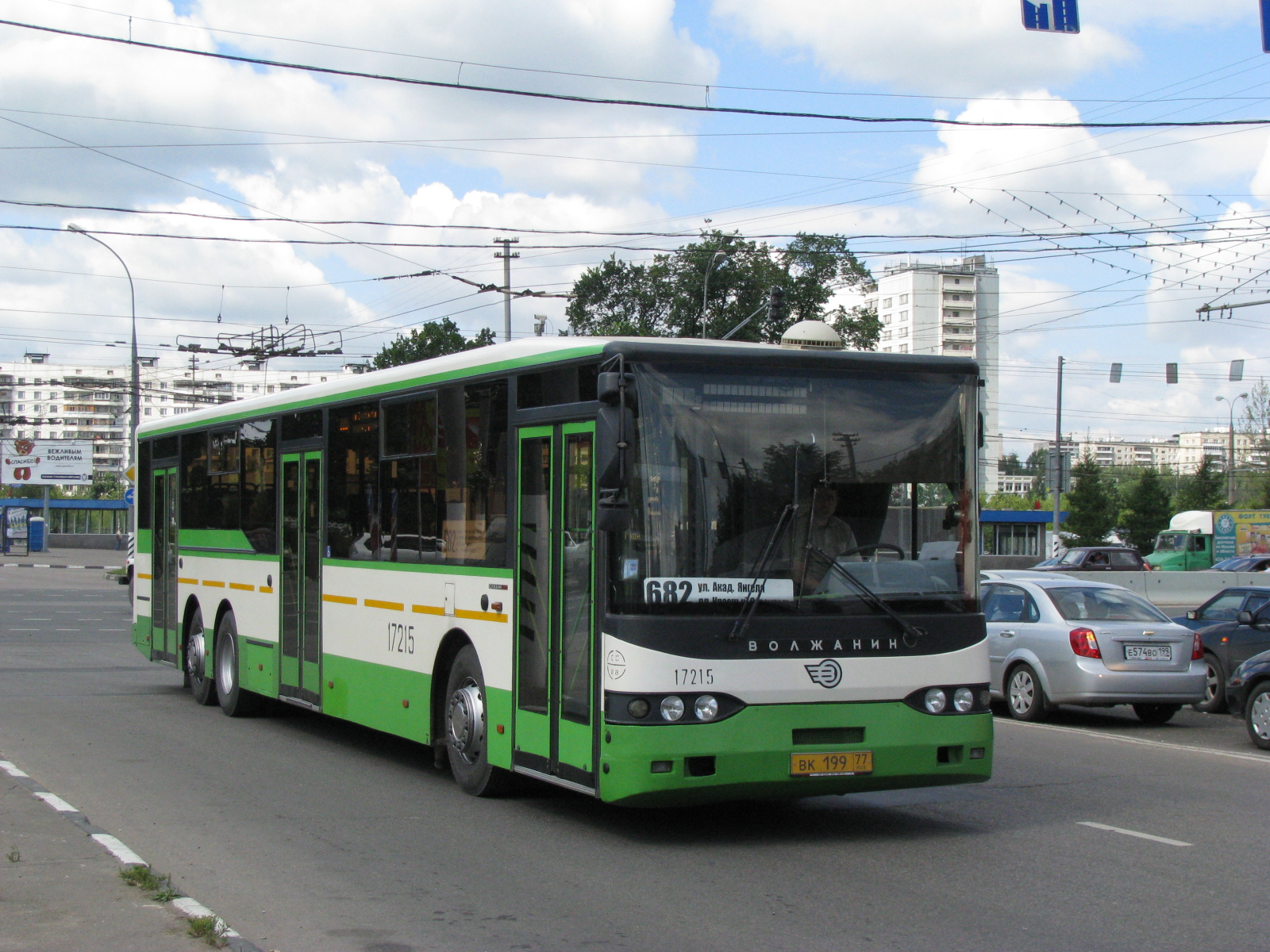 Волжанин-6270.10 № 17215, Россошанская ул.